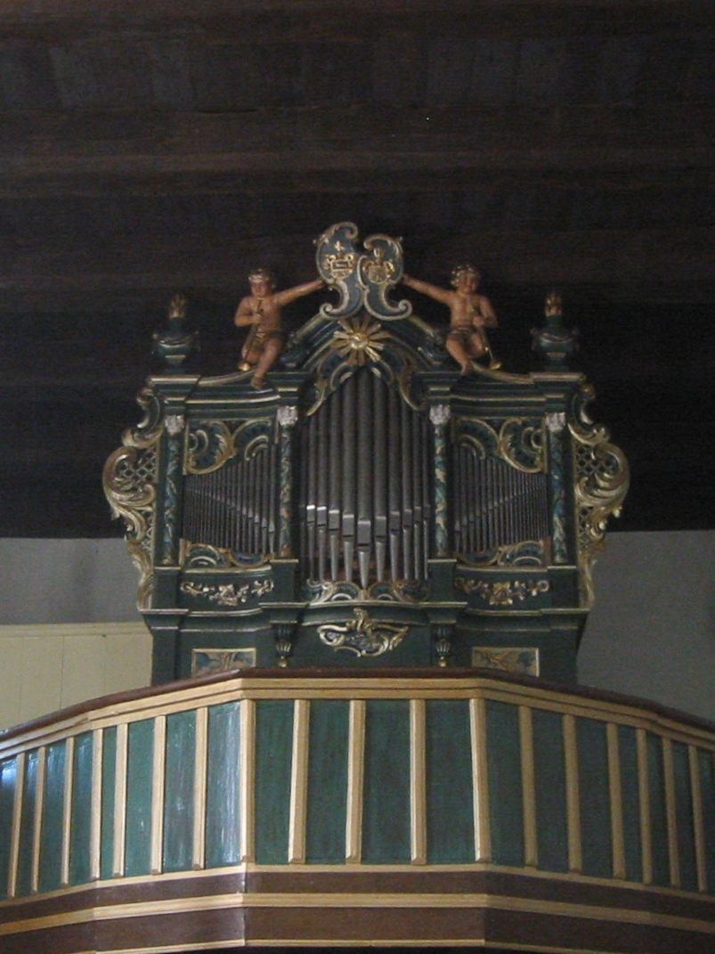 Orgel von Johann-Peter Migendt in der Dorfkirche Ringenwalde in Temmen-Ringenwalde, Uckermark, Brandenburg